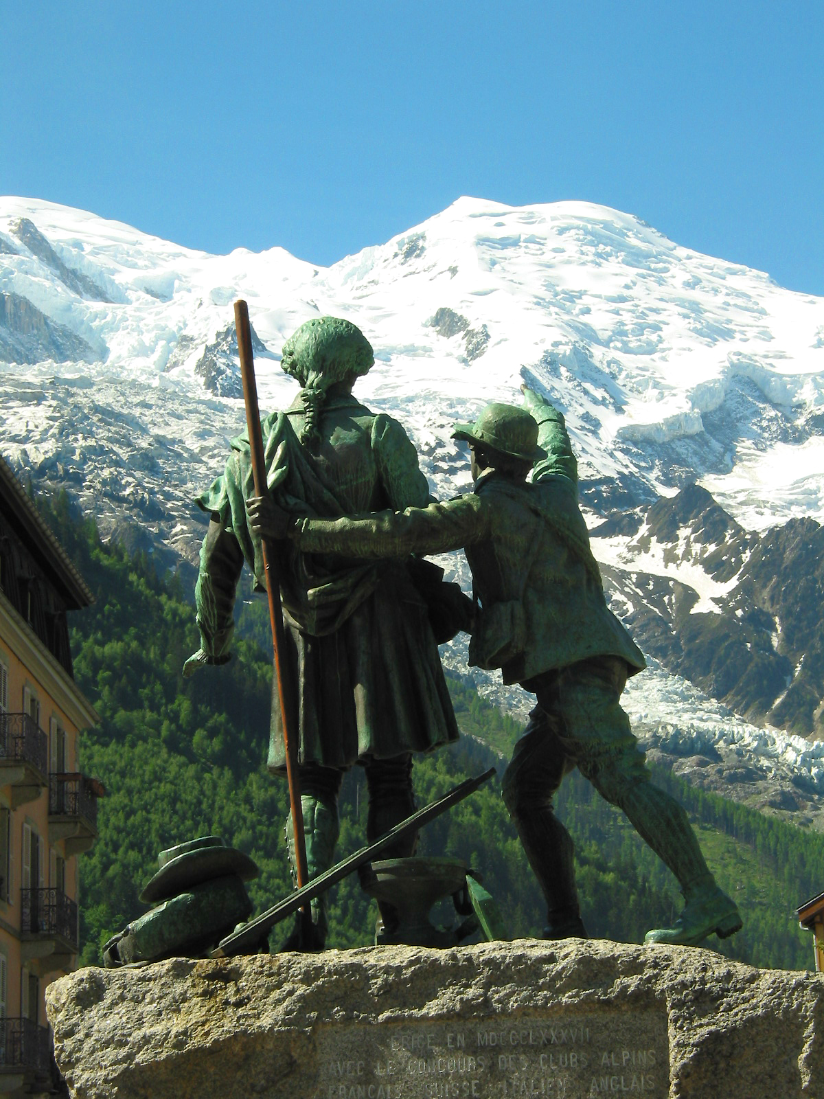 Chamonix-Mont-Blanc (Haute-Savoie - France), statue du guide Jacques Balmat indiquant le sommet du Mont Blanc de sa main droite à Horace-Bénédict de Saussure (botaniste, philosphe et géologue genevois considéré comme le fondateur de l'alpinisme).